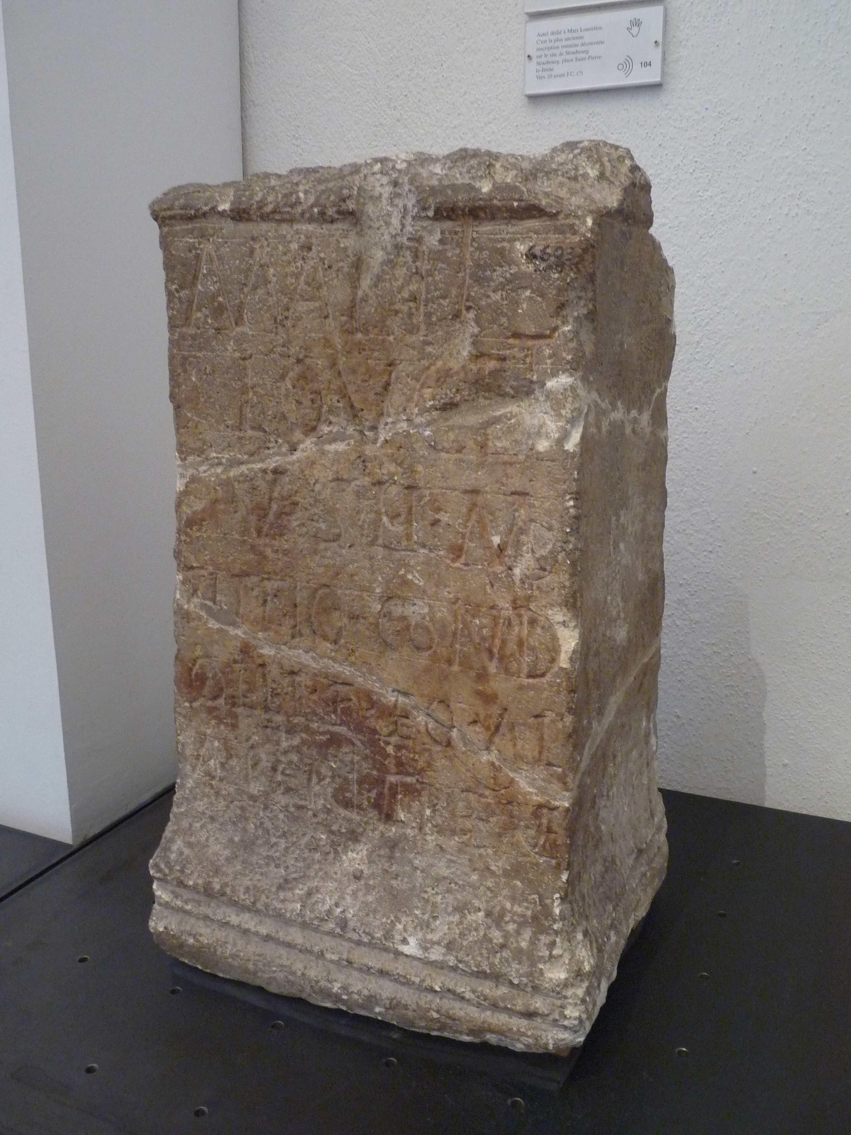 Autel dédié à Mars Loucetios, 10 avant JC (?), avec la plus ancienne inscription romaine découverte à Strasbourg. Trouvé à Strasbourg, place Saint-Pierre-le-Jeune. Musée archéologique de Strasbourg